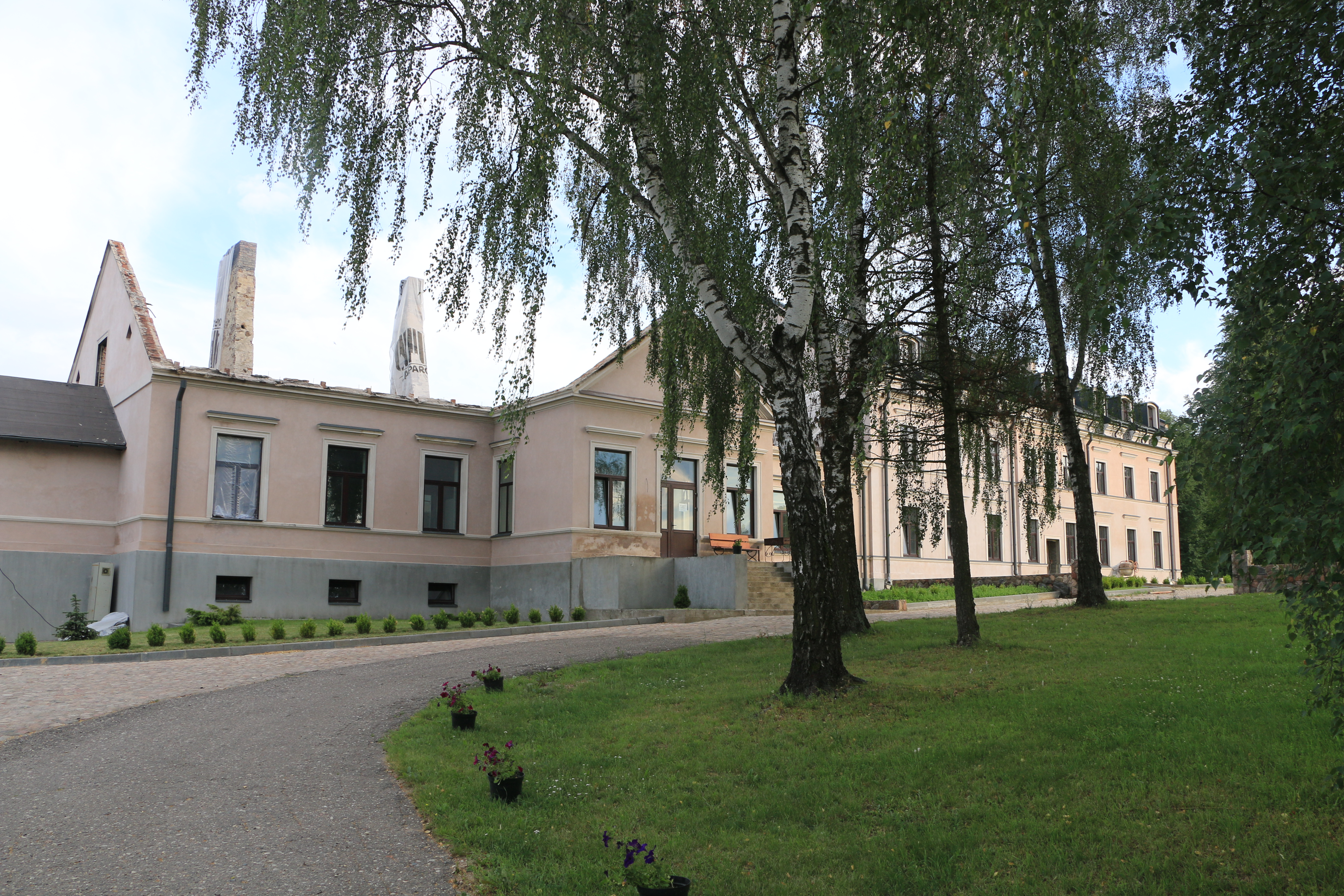 Radzivilki, Belarus